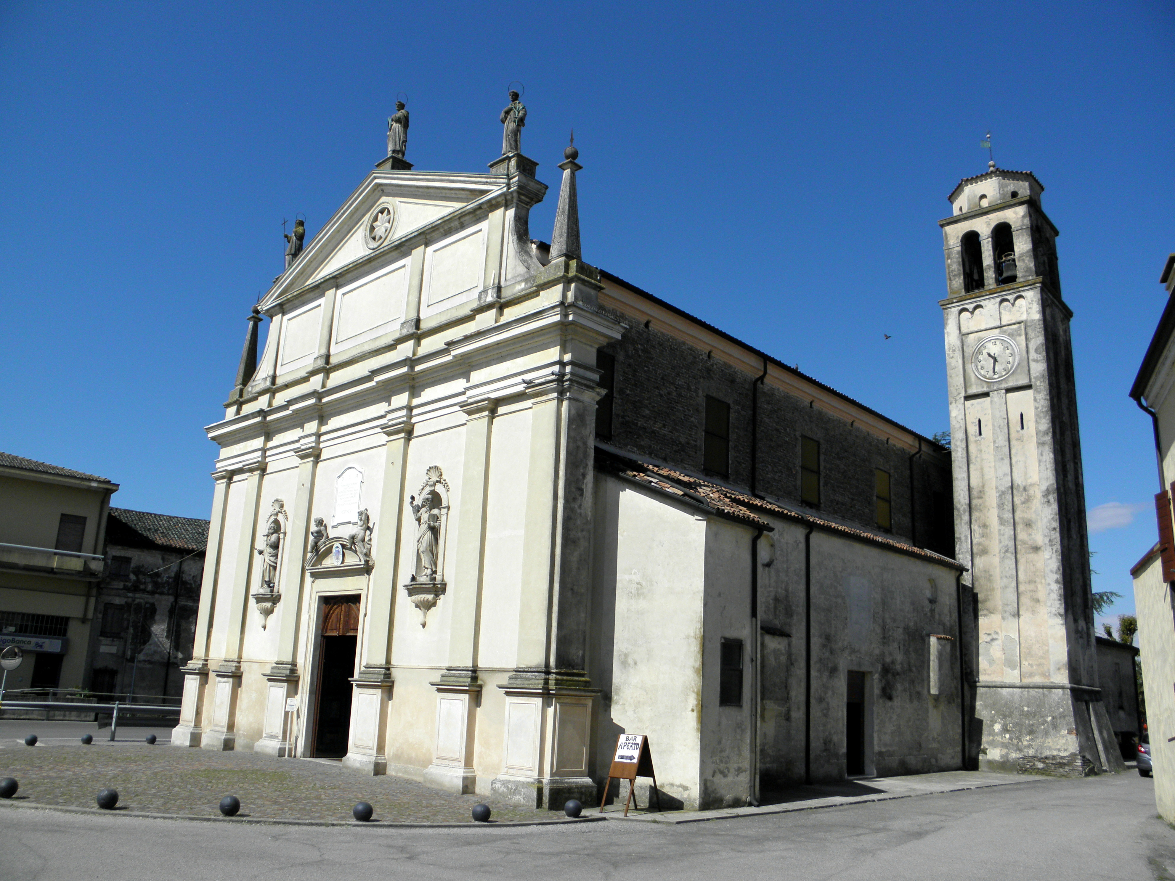 Baruchella, sede municipale del comune di Giacciano con Baruchella: la chiesa parrocchiale di San Pietro martire.